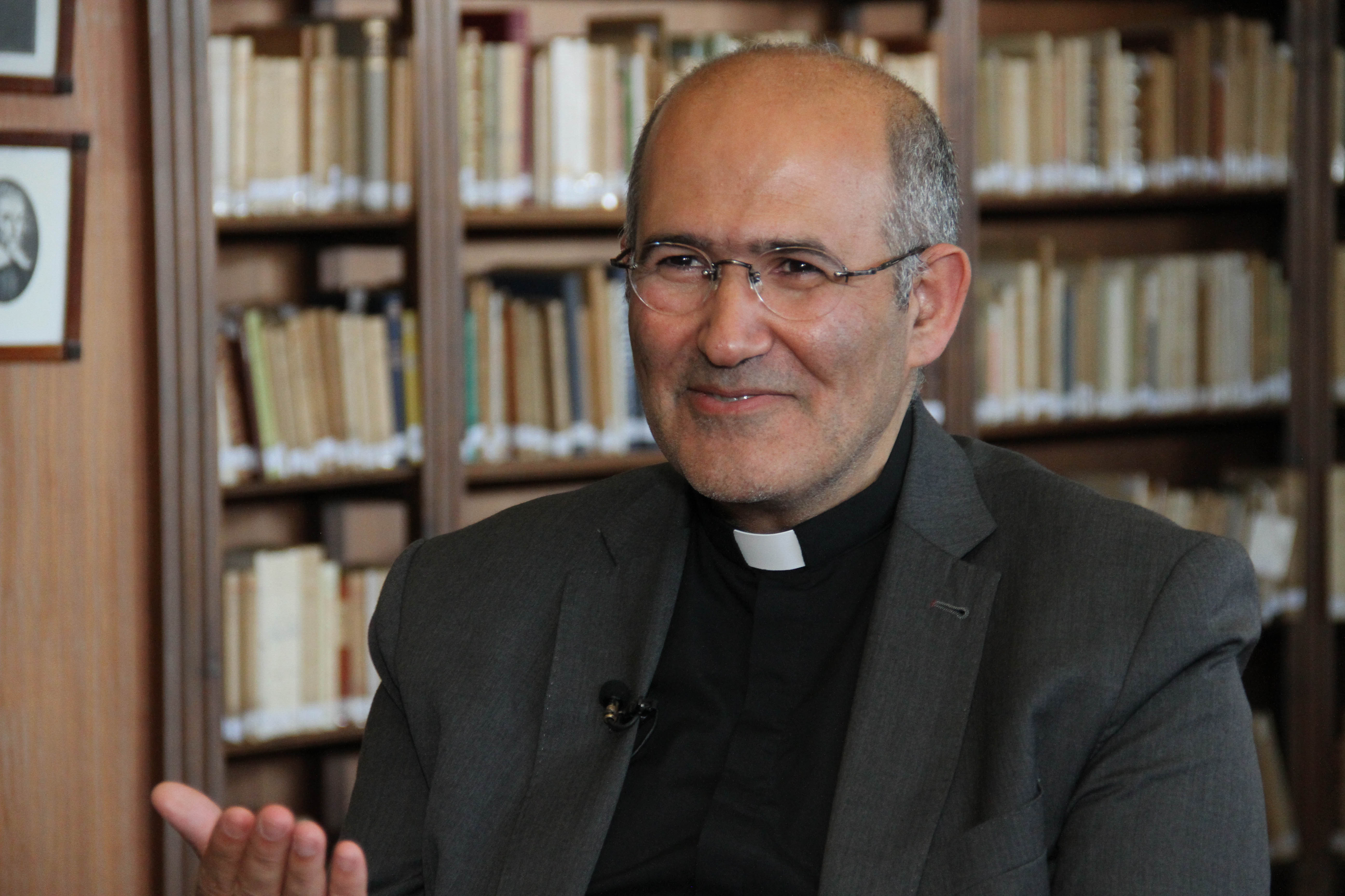 Portrait de Mgr José Tolentino Mendonça, archevêque titulaire de Suave, archiviste et bibliothécaire du Vatican